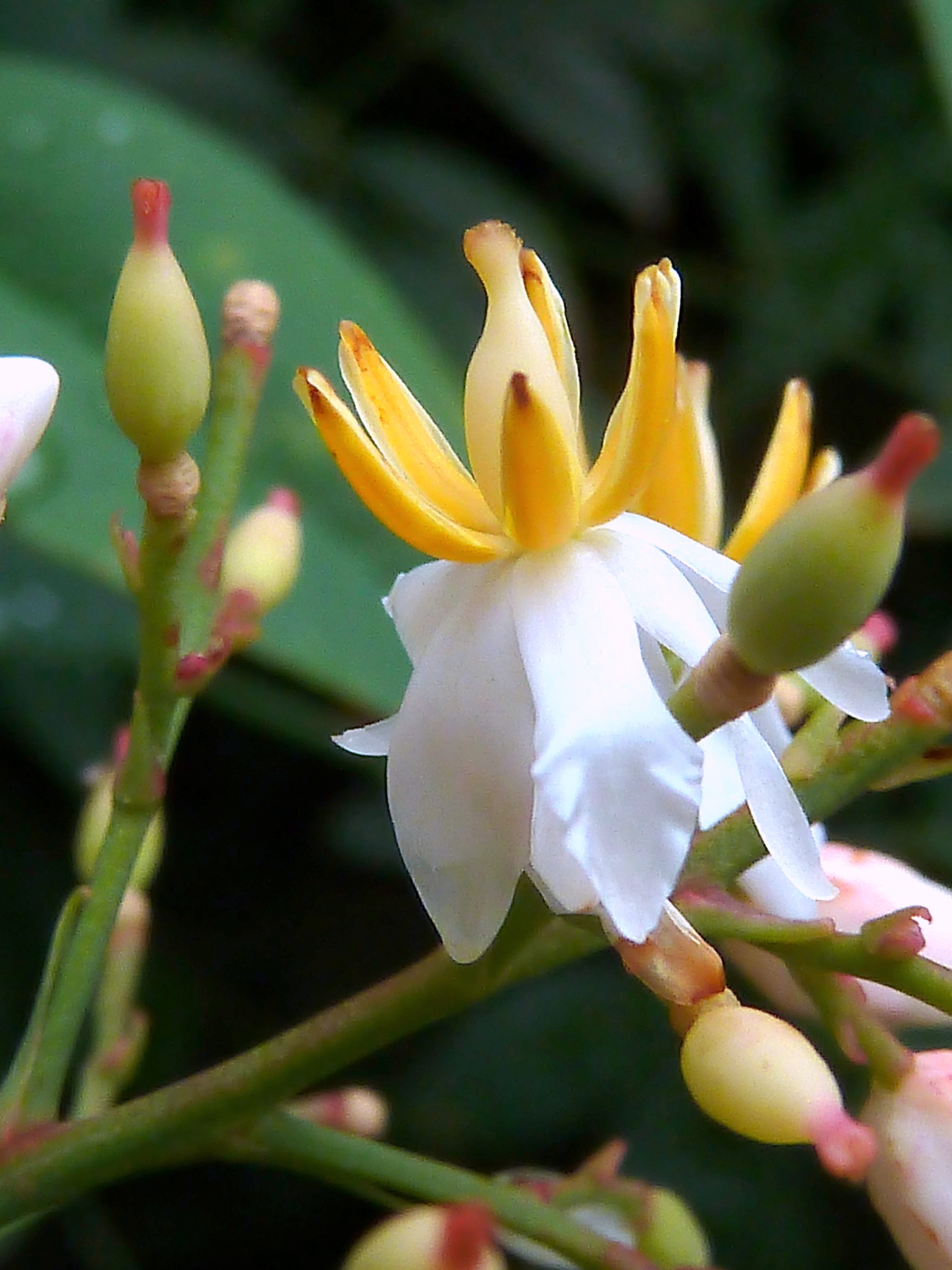 Nandina domestica ( Bambú sagrado) - Flores. -Cultivado/ornamental, Paseo de El Salvador, Parque del Buen Retiro, Madrid (España).